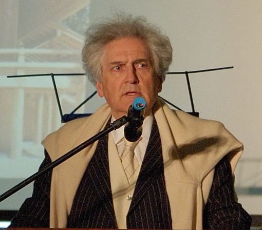 Leon Krier beim Altstadtforum im Vestibül der Alten Oper in Frankfurt am Main